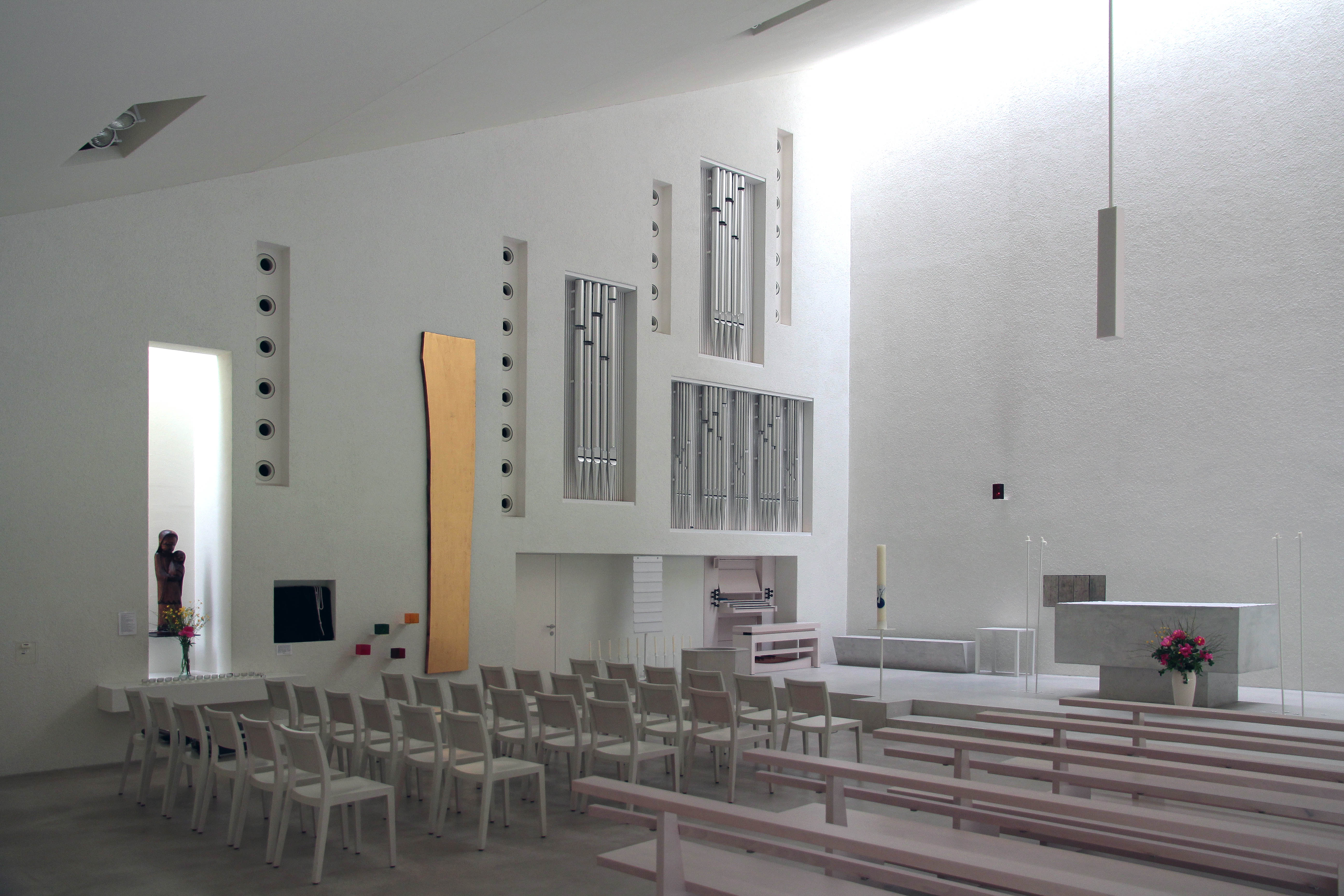 Römisch-katholische Kirche St. Franziskus Uetikon, Orgel